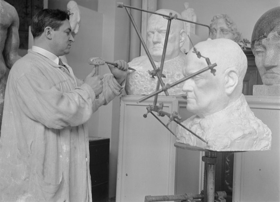 Wäinö Aaltosen omakin olemus oli veistoksellinen.